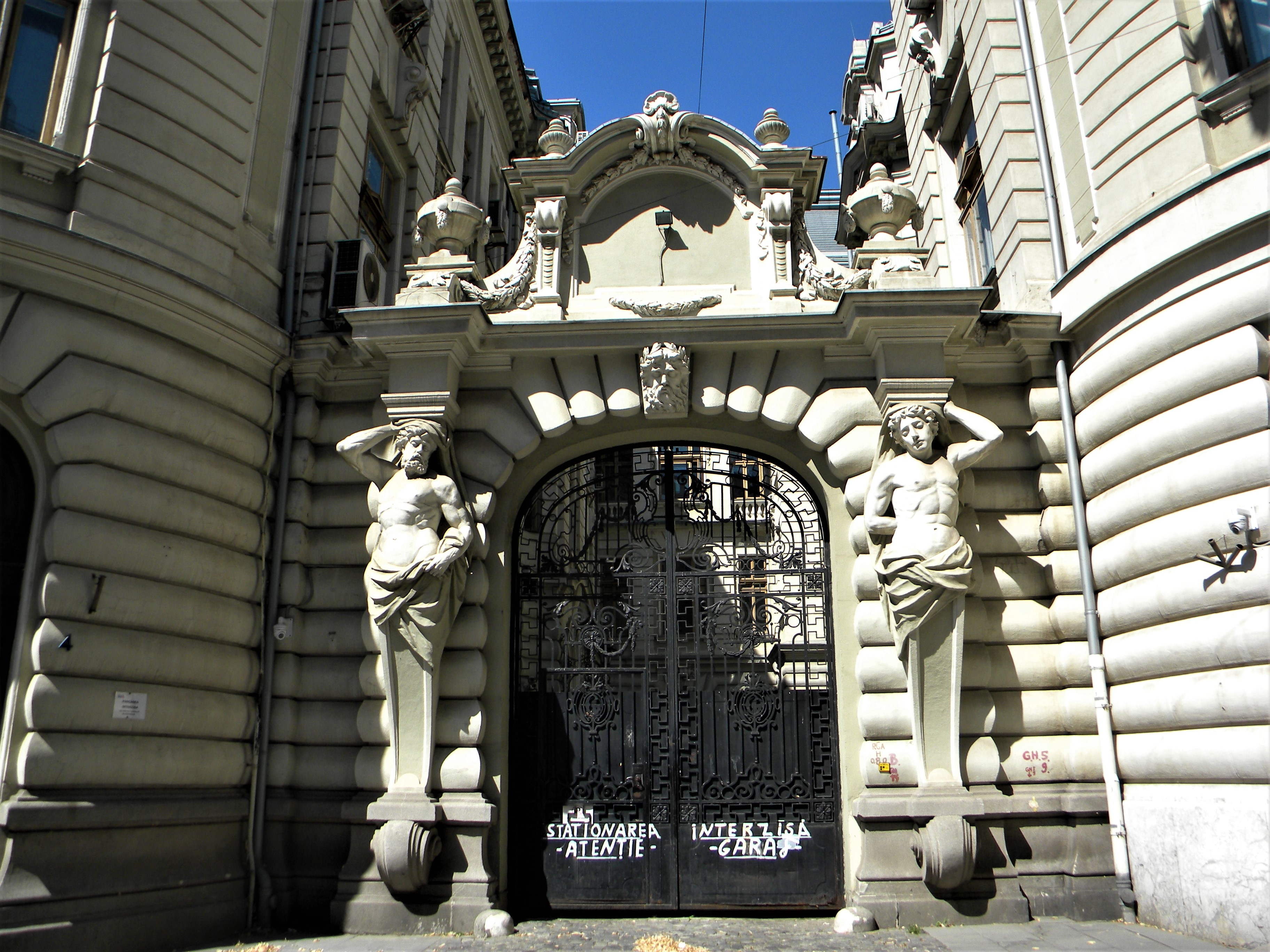 Bucuresti, Romania, BCR (Poarta) (B-II-m-A-18675). Banca Comerciala Romana Fostul Palat al Societatii de Asigurari “Generala”. Palatul Societăţii de Asigurări "Generala" (operă a arhitectului Oscar Maugsch) a fost construit în locul vechii grădini a Palatului Suțu (actual Muzeul al Bucureștilor), fiind finalizat în 1906.